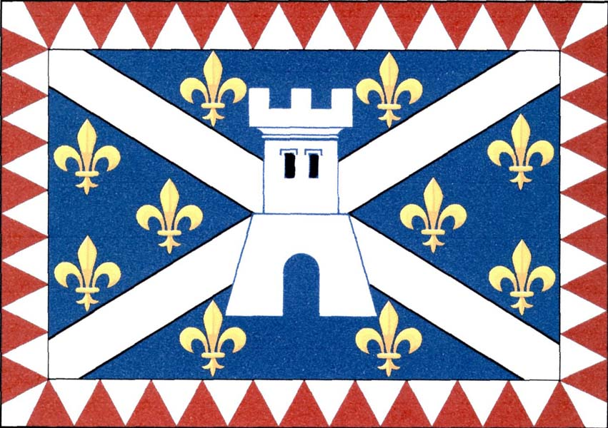 Vlajka obce Velichov